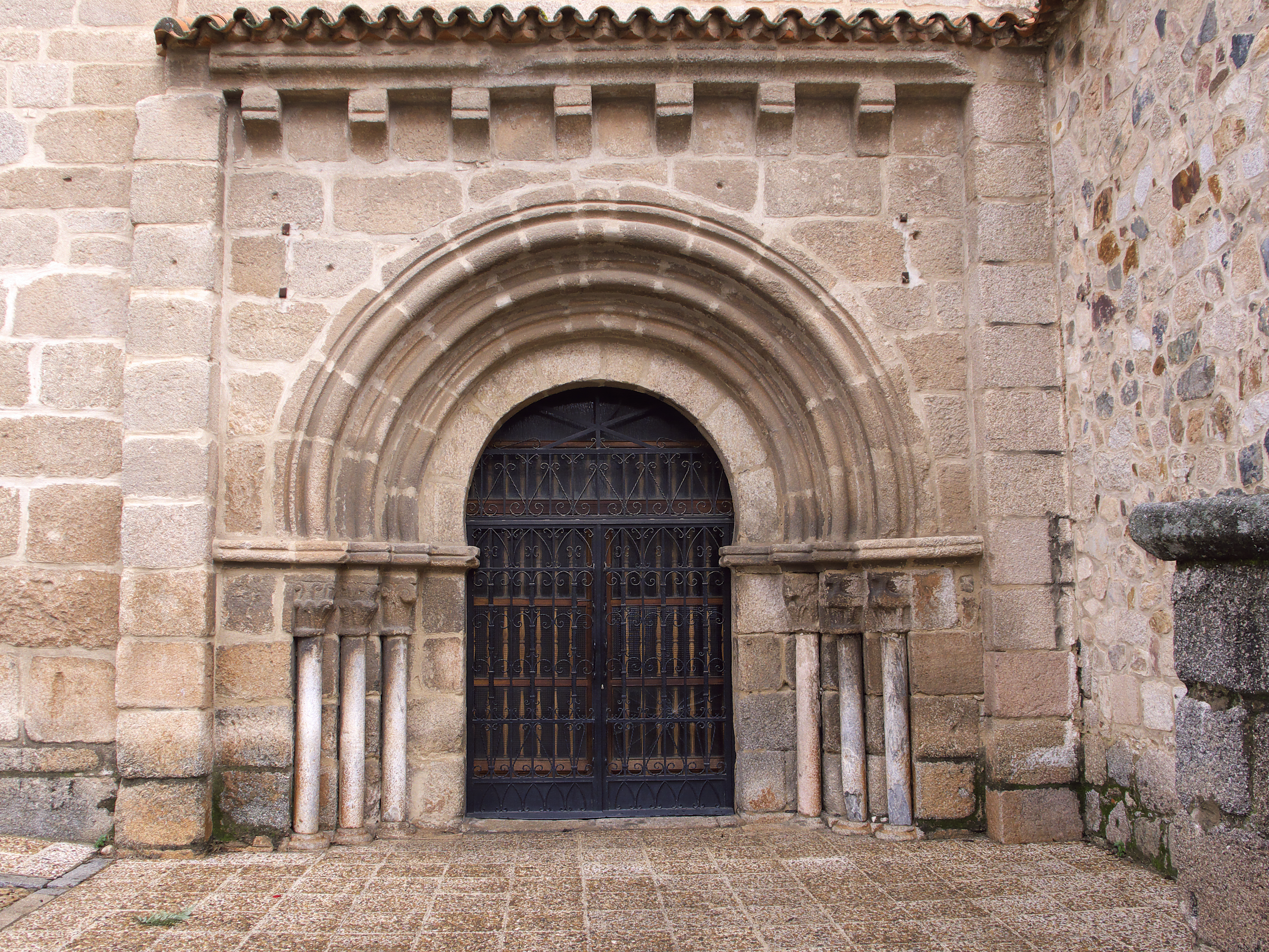 Portada románica. Sus comienzos, fechados en el siglo XIII. NOTE: At the time of this photo , this portal was under conservation. The mortar over much of the visible building has been entirely repointed with a mix that fills holes to prevent water ingress and further damage, but is softer than the stone, and therefore reversible. The mortar has been coloured in the archivolt where the stone is darker. Some areas to the right have not been completed. This work has been done in accordance with ICOMOS principles, and is a good example of building conservation.